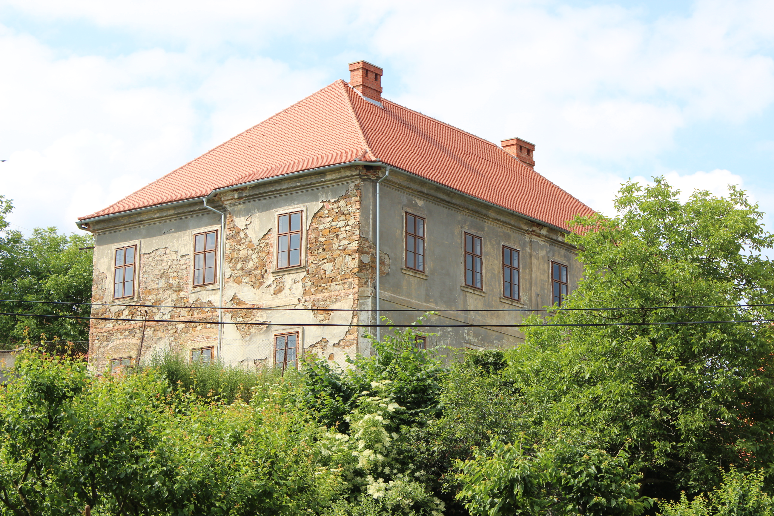 Zámek ve Všetatech v rakovnickém okrese (dům číslo popisné 34); pohled od jihu.